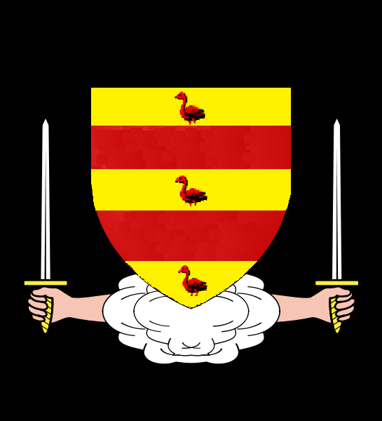 blason du connetable de france Dreux IV de Mello